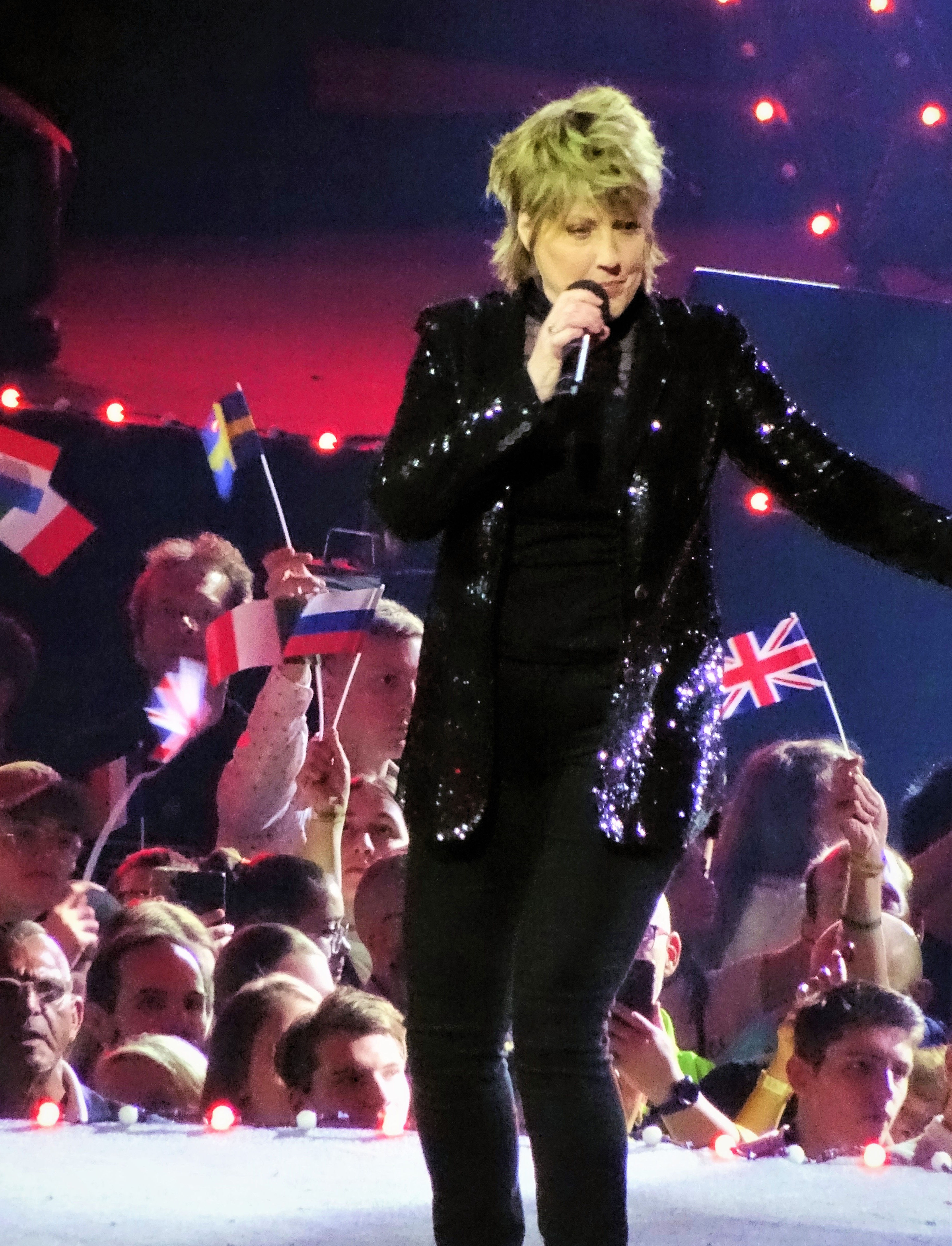 Katrina Leskanich tijdens Het Grote Songfestivalfeest in het Ziggo Dome 15 december 2019